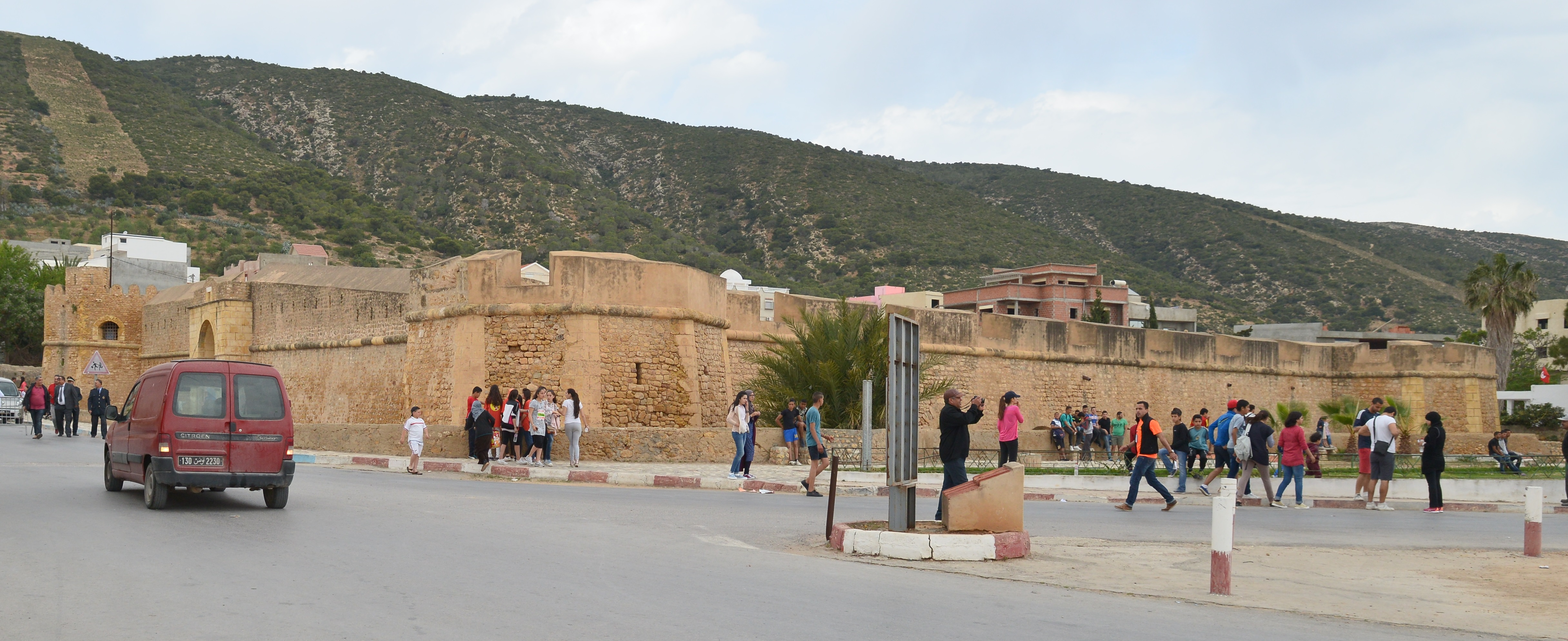 Borj El Loutani (en bas du village) près du vieux port le jour du 4ème semi-marathon de Ghar El Melh